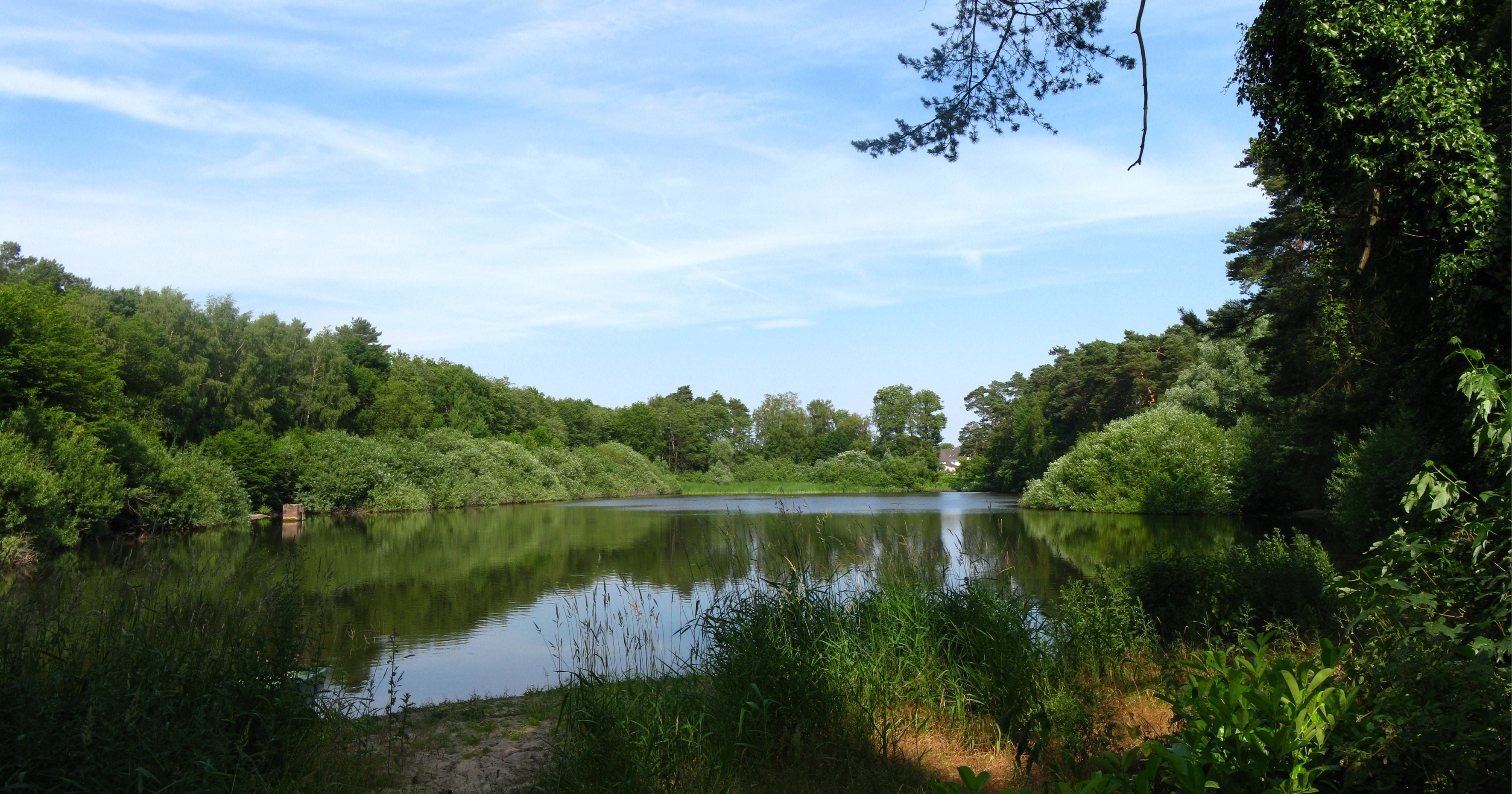 Der Postteich